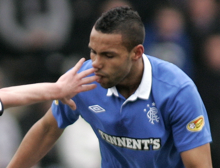 Kyle Bartley Rangers